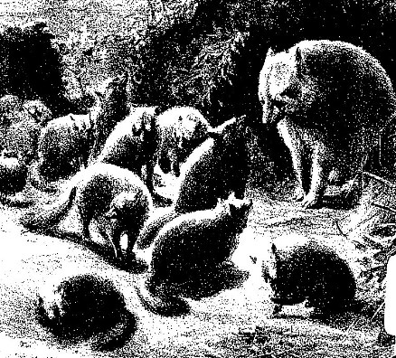 Happyakuya-Tanuki Matsuyama-kidan (八百八狸 松山奇談)